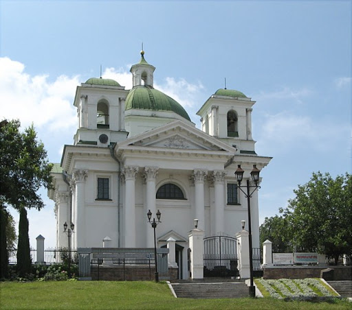 Построен по подобию части Троицкого собора Александро-Невской лавры в Петербурге.